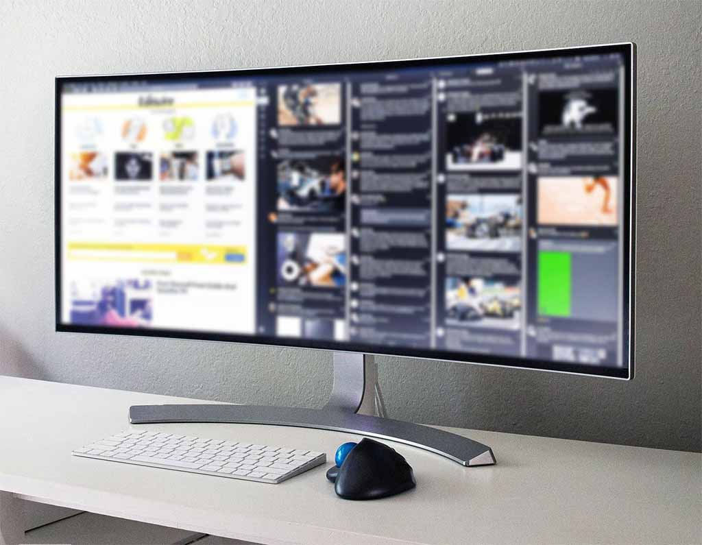 Um monitor ultrawide, de formato 21:9, comumente vendido